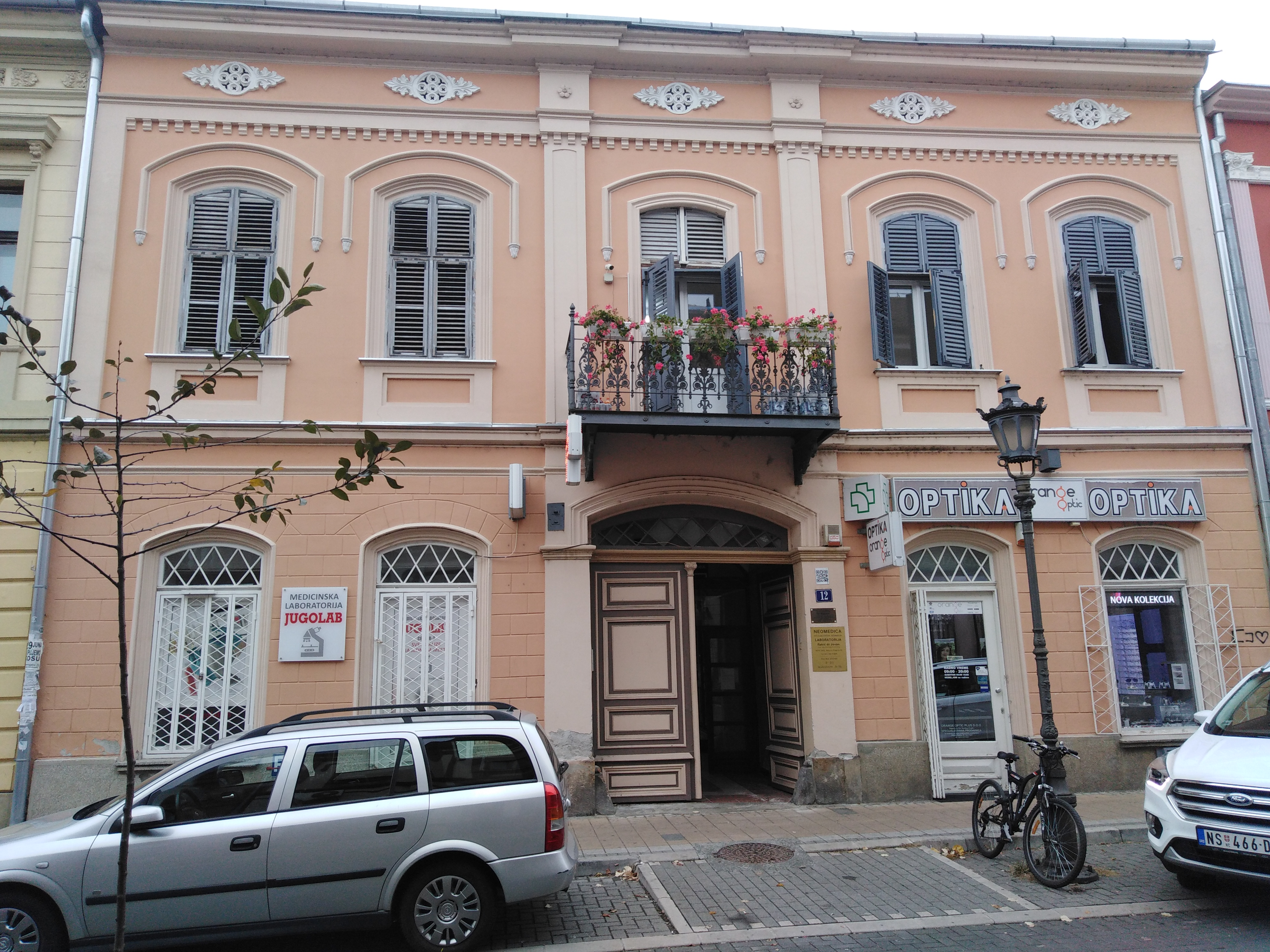 Кућа у којој је живео Дорђе Ђока Мијатовић у Новом Саду. Данашња улица Николе Пашића број 12